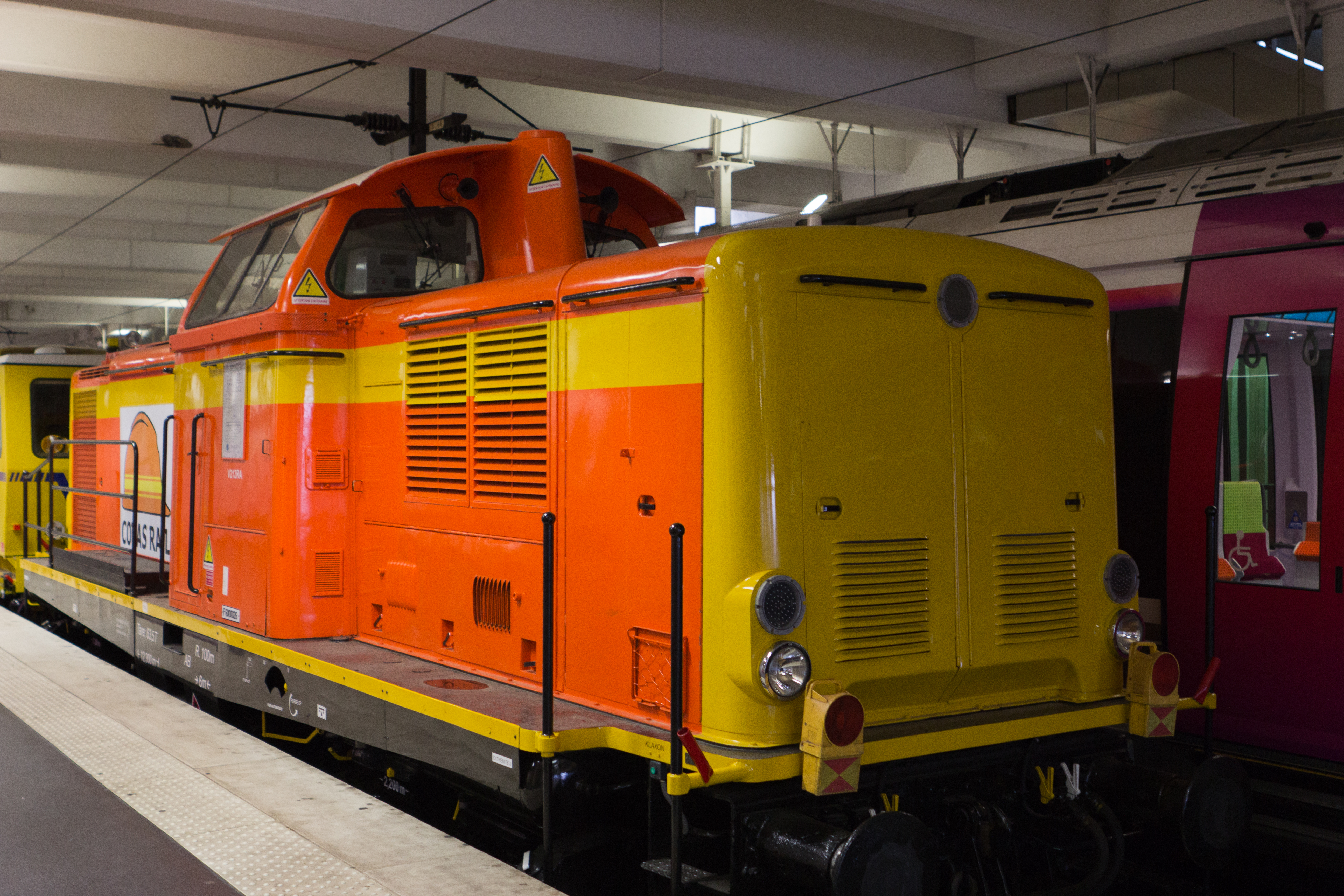 Exposition d'un train de travaux en gare de Paris-Nord (France) le 31-08-2012. Locomotive Class V212 de la société Colas.